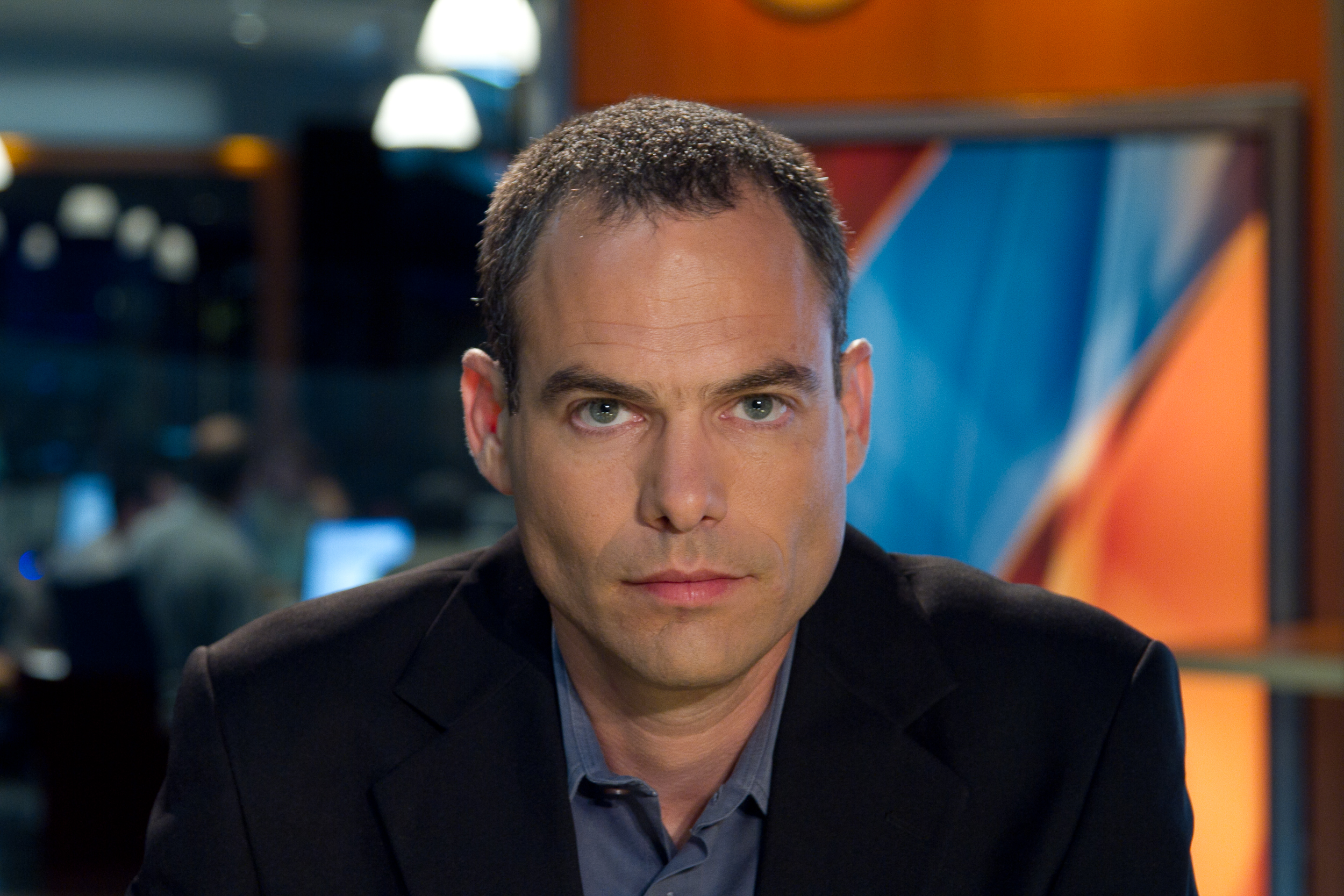 רועי שרון עיתנאי ישראל